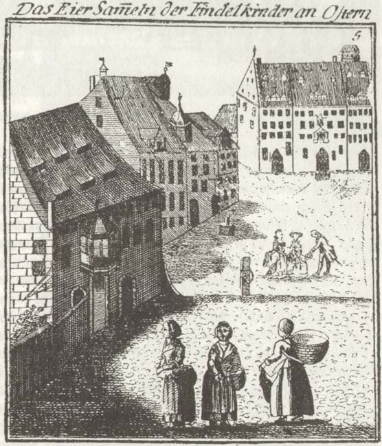 Das Eier Sammeln der Findelkinder an Ostern. Es ist den Findelkindern in Nürnberg erlaubt zur öesterlichen Zeit in der Stadt herumzugehen und von Haus zu Haus unter dem Ausruf Grüss Euch Gott die Findelkinder sameln die Eier die Bürger anzuruffen von welchen sie mildthatigst allerley Gaben erhalten.